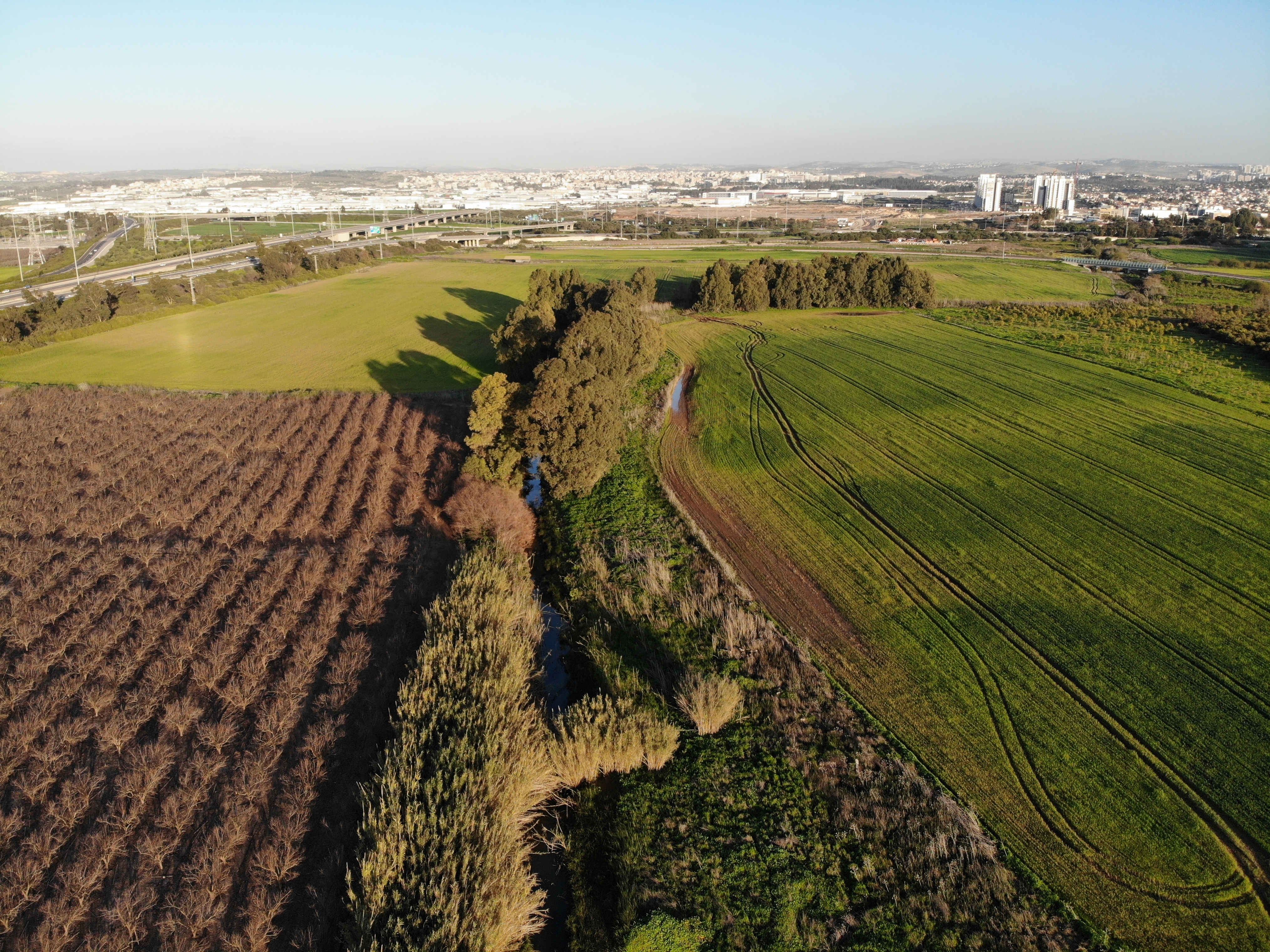 מבט על נחל רבה לכיוון מזרח, בסמוך לנקודת החיבור שלו עם נחל הירקון. ברקע בצד שמאל - מחלף קסם וכפר ברא. ברקע במרכז התמונה - אזור התעשייה לב הארץ, כפר קאסם ופארק סיבל ברקע בצד ימין - ראש העין